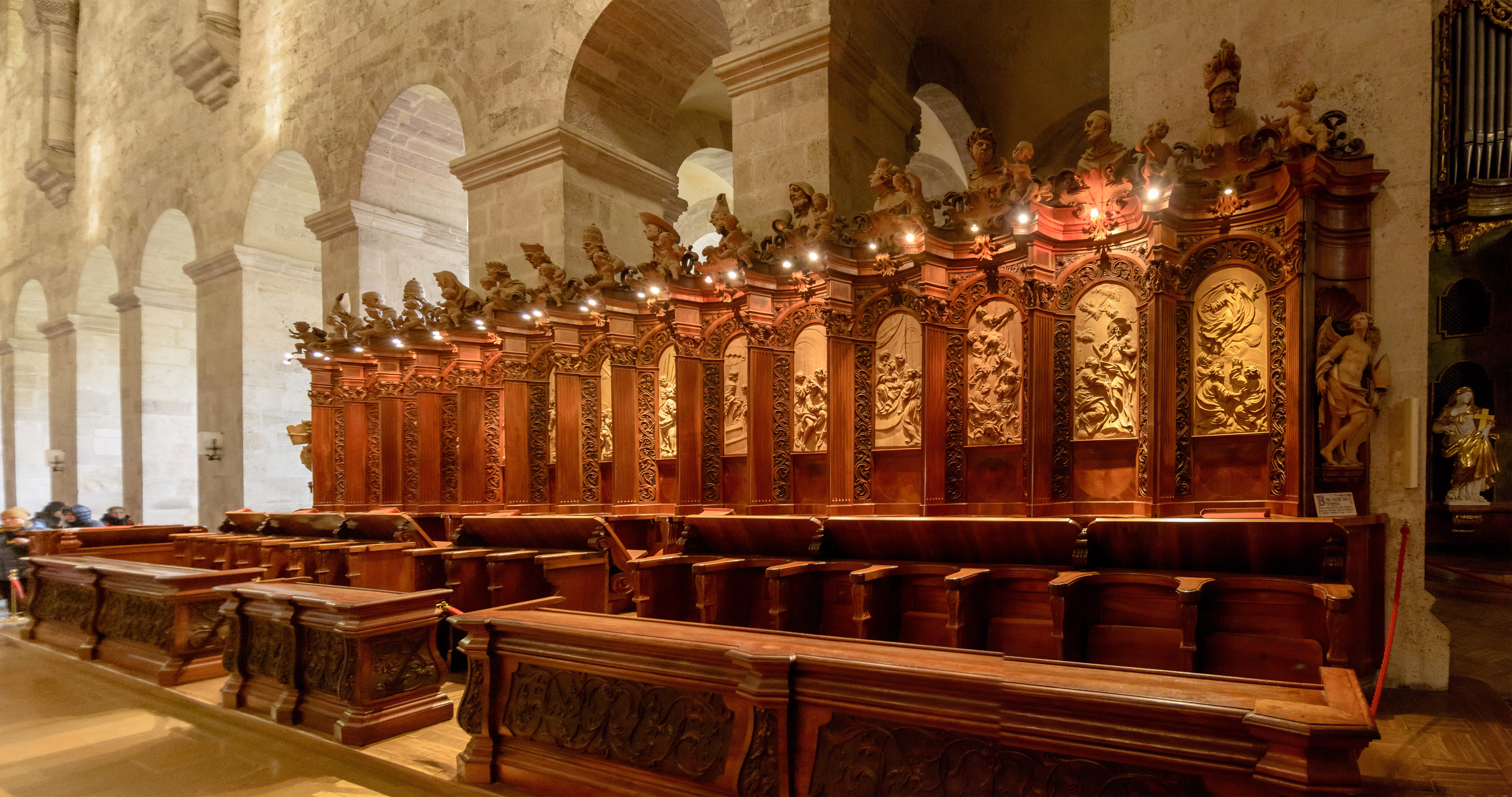 Kloster-/Stiftskirche Unsere Liebe Frau